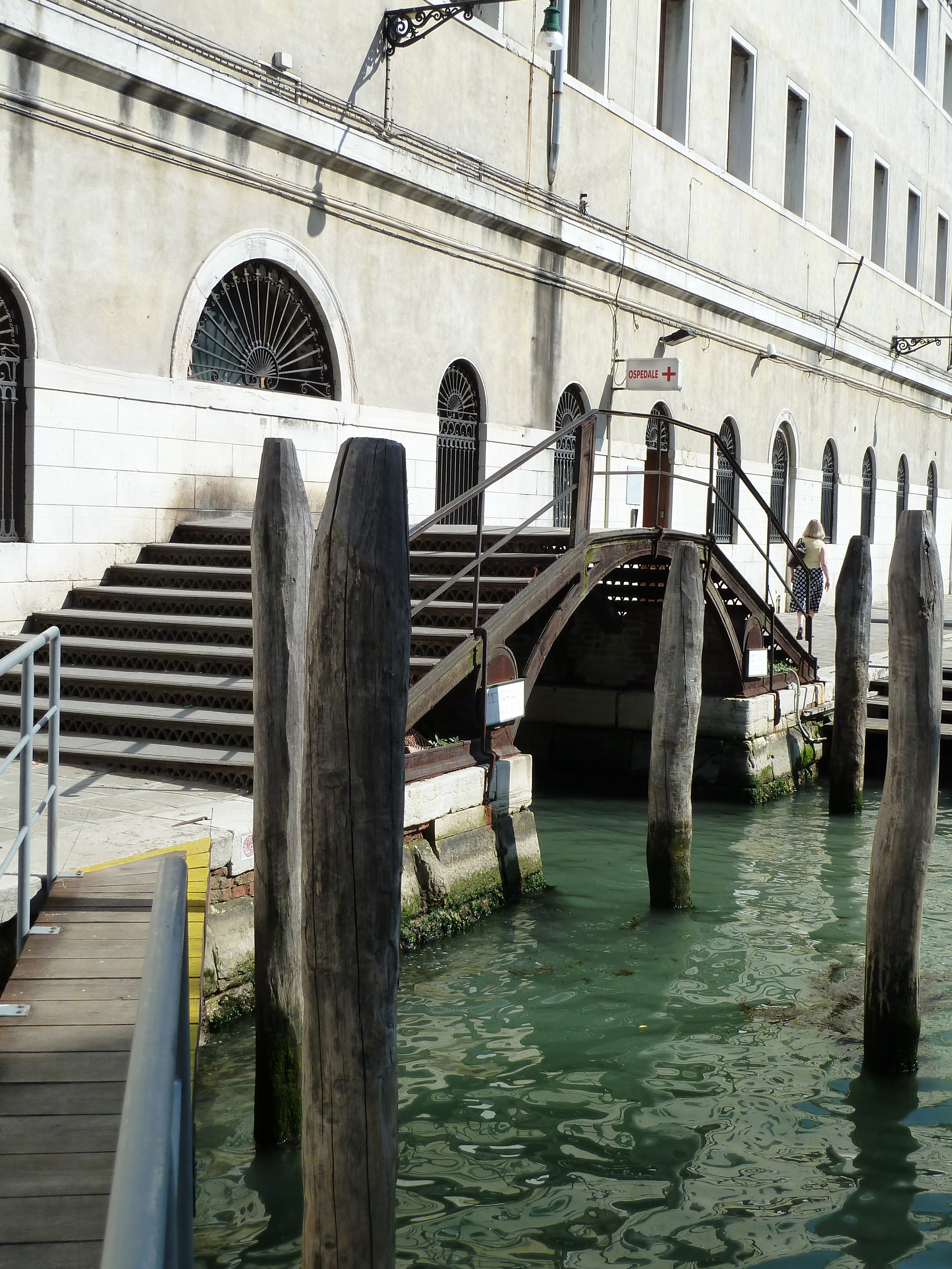 Ponte della Cavana dell'Ospedale ai Mendicanti (Venice)